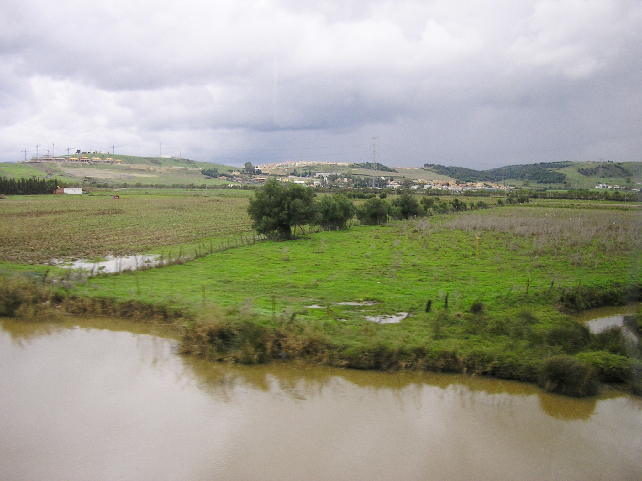 Marismas del río Palmones en Los Barrios, España